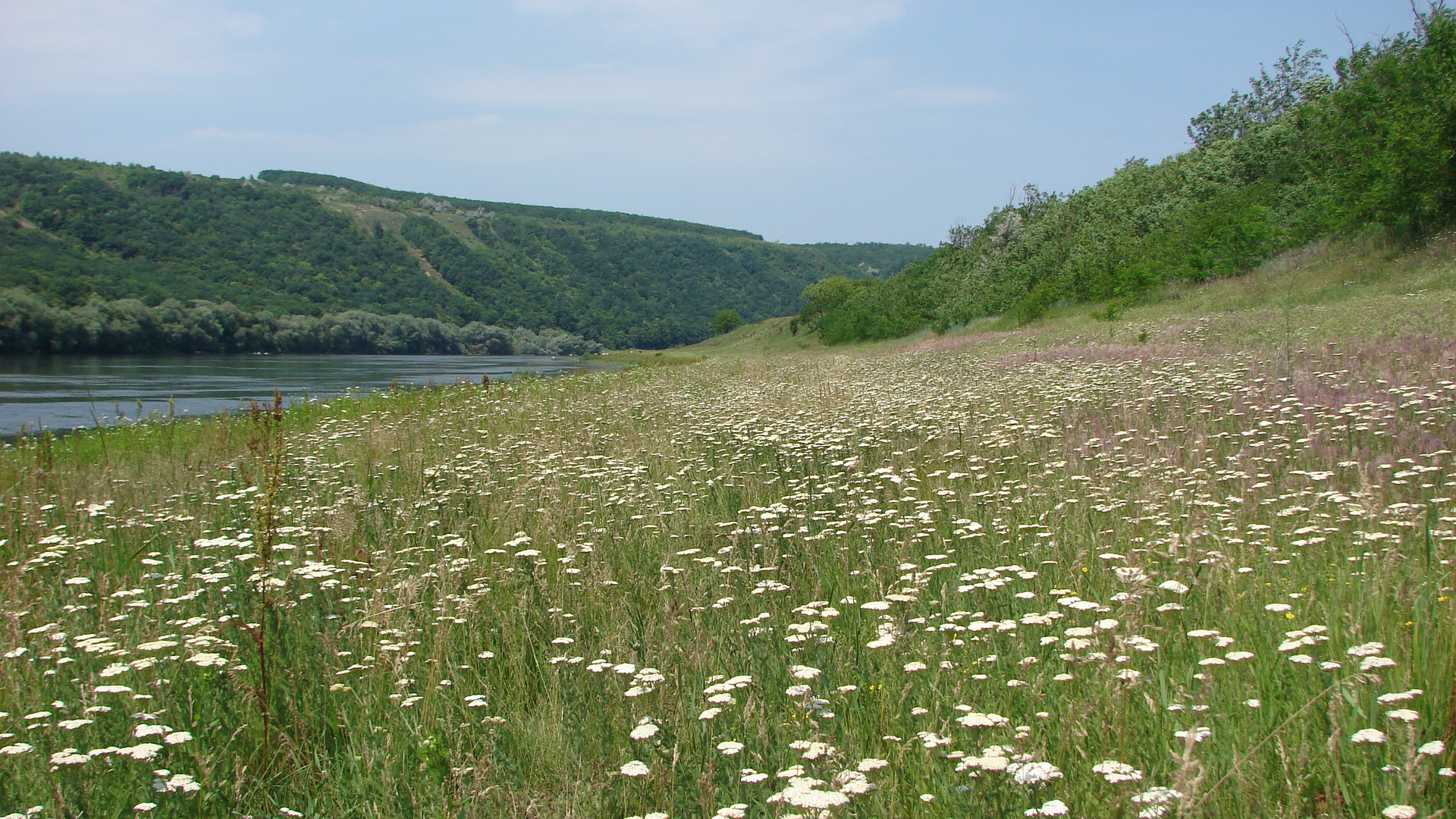 Регіональний ландшафтний парк «Дністер», Могилів-Подільський, Ямпільський р-н.